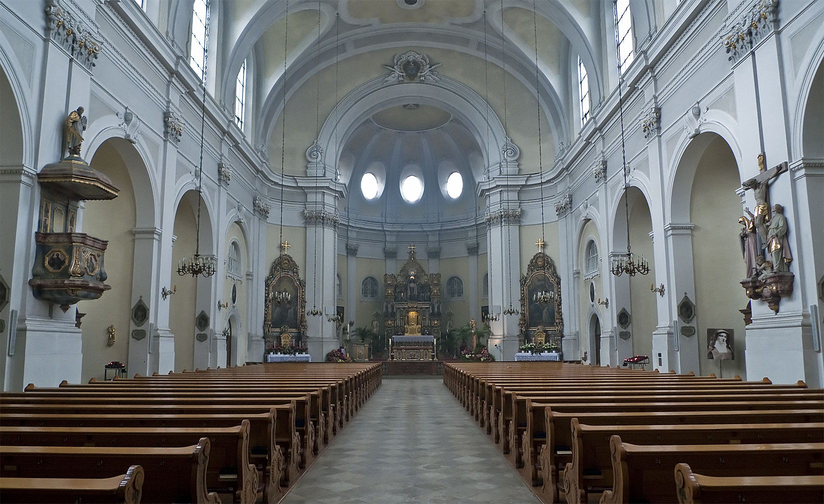 St.-Theresia-München-Innen